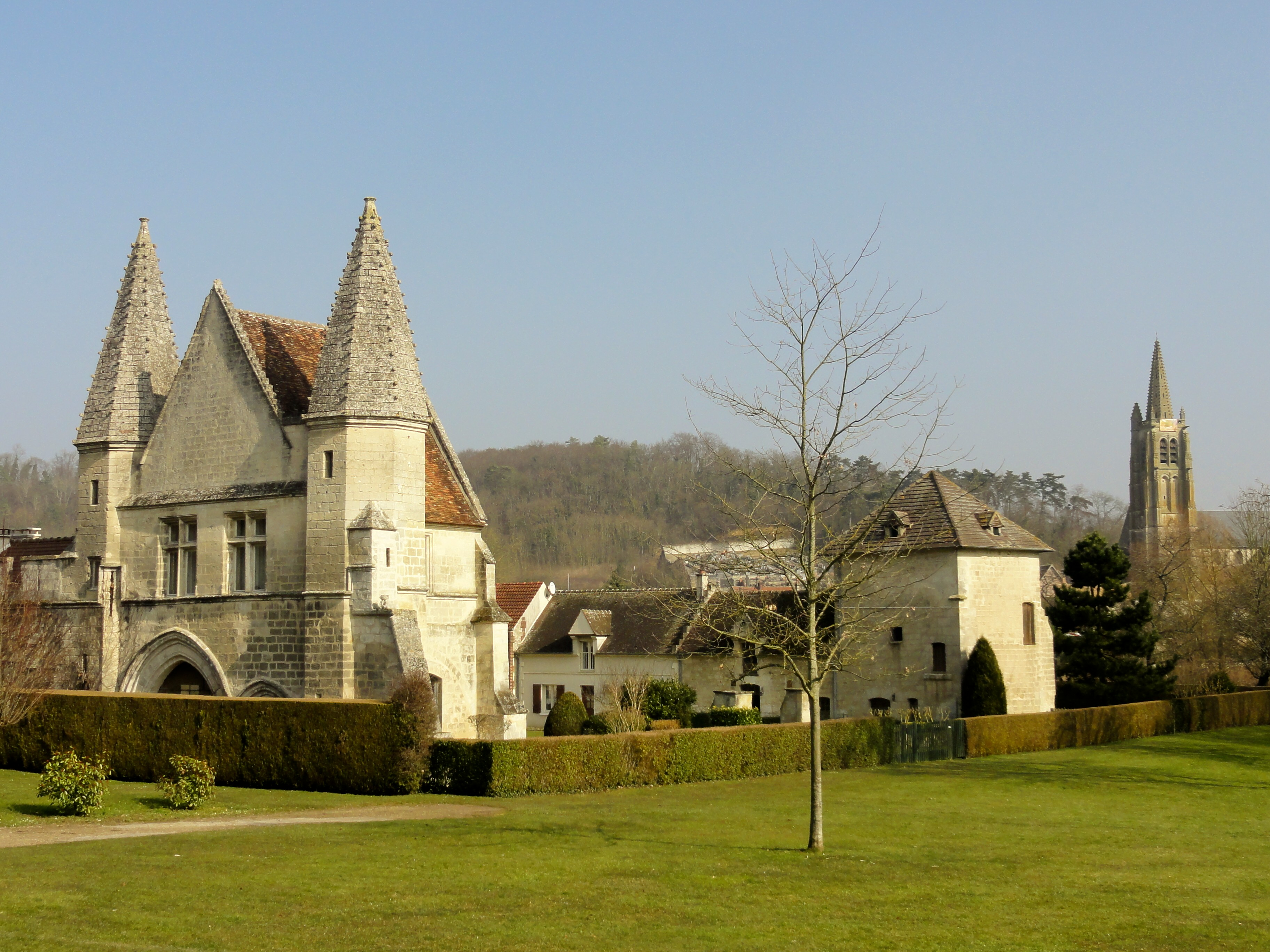 Château du roi Jean, façade occidentale ; à droite l'ancien colombier puis le clocher de l'église Saint-Pierre.